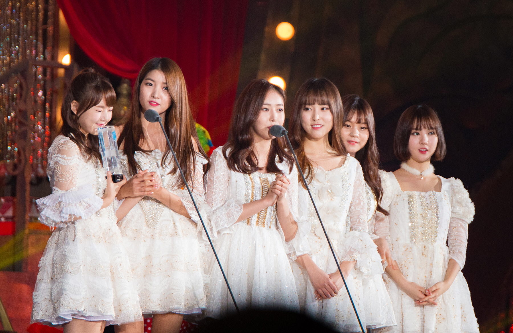 20161119 여자친구 멜론뮤직어워드